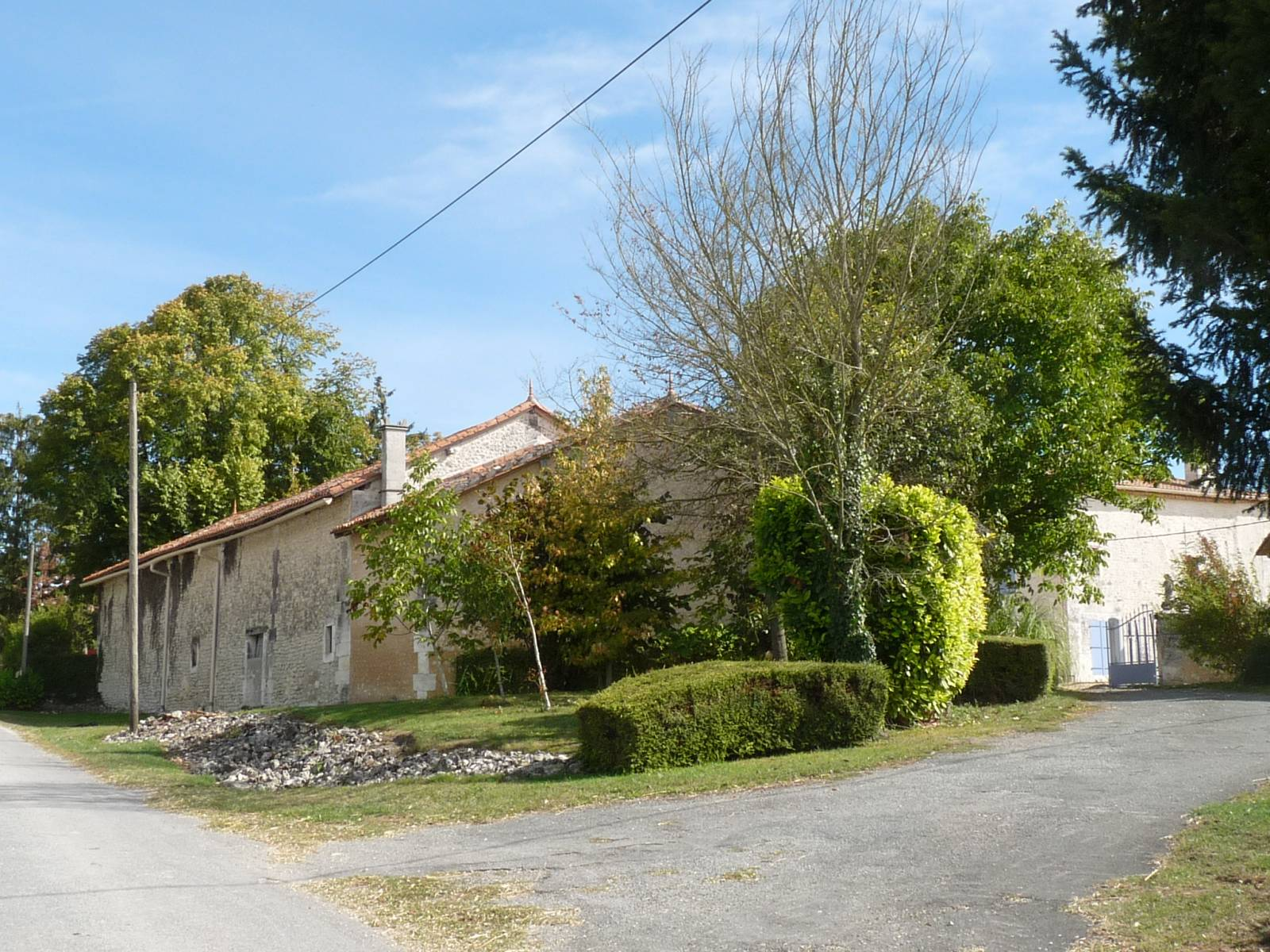 hameau de St-Sébastien, Bouteilles-St-Sébastien, Dordogne, France